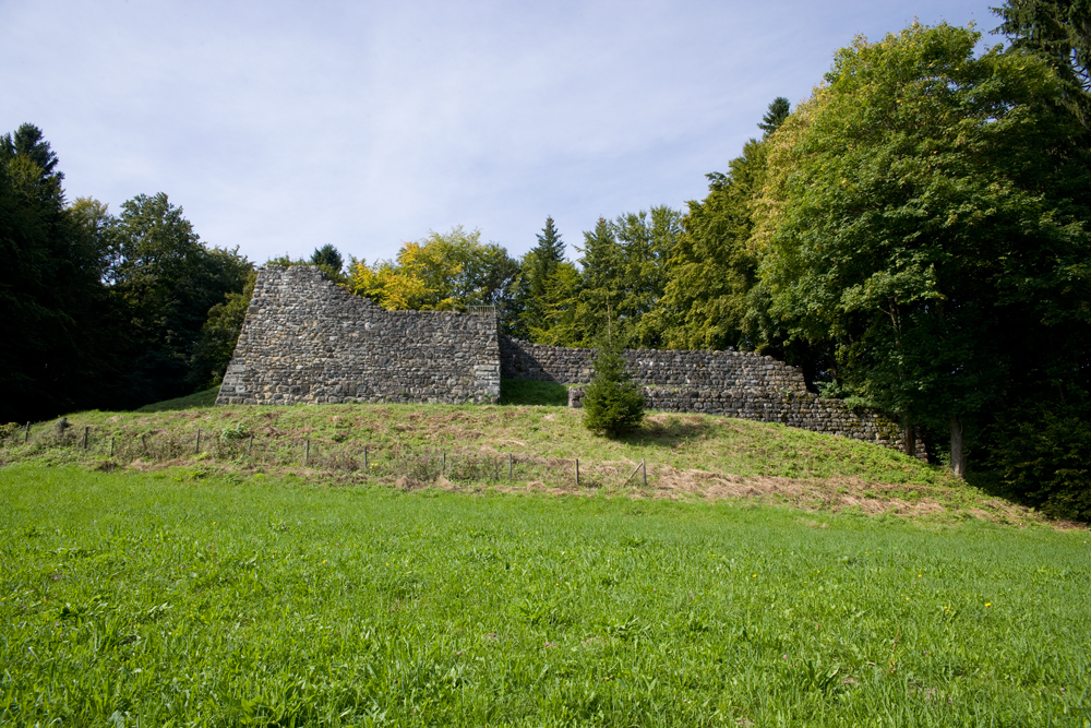 Ruine Oberrinach bei Herlisberg, Römerswil Luzerner Seetal